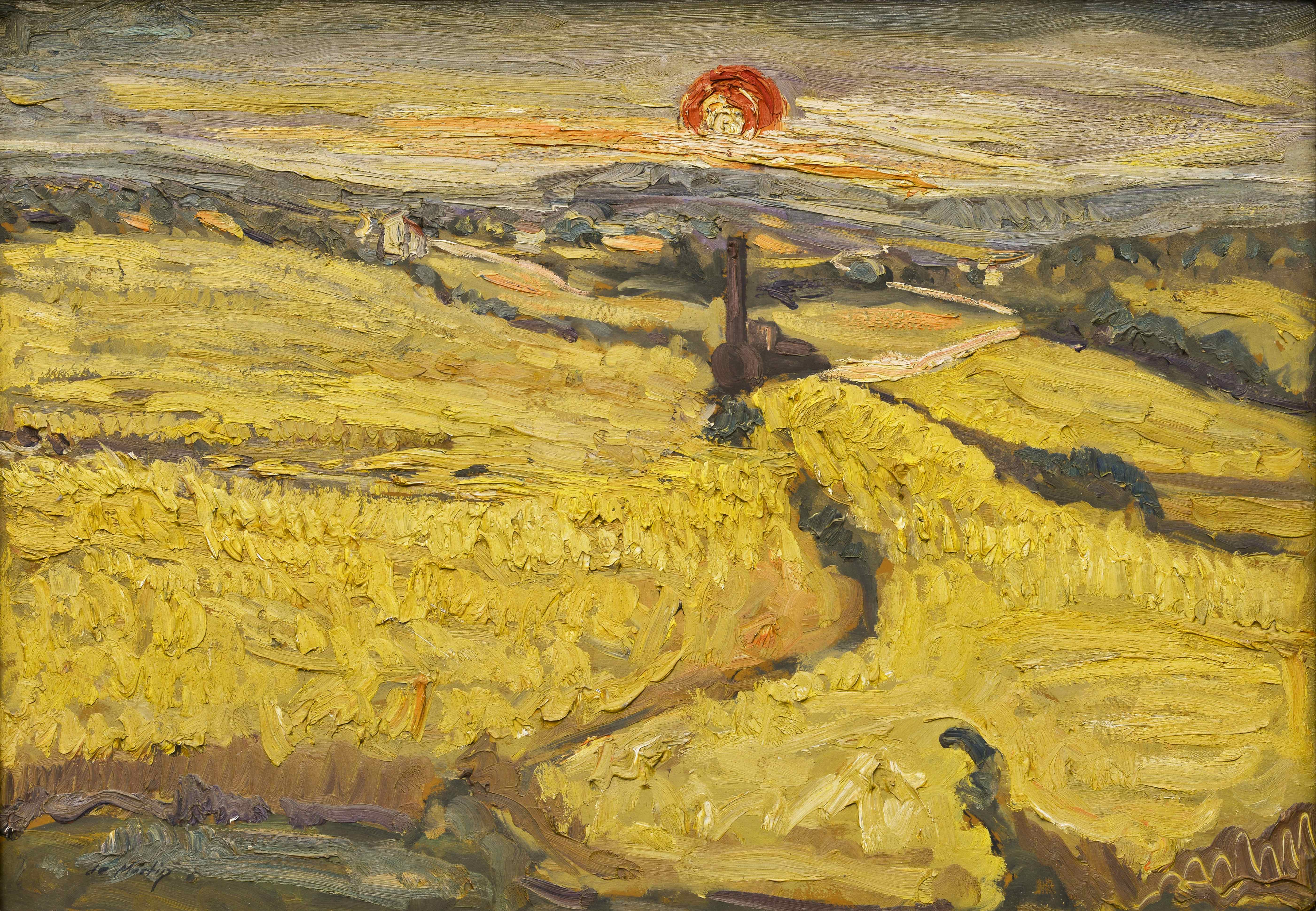 Campos Segados, paisaje etapa vasca